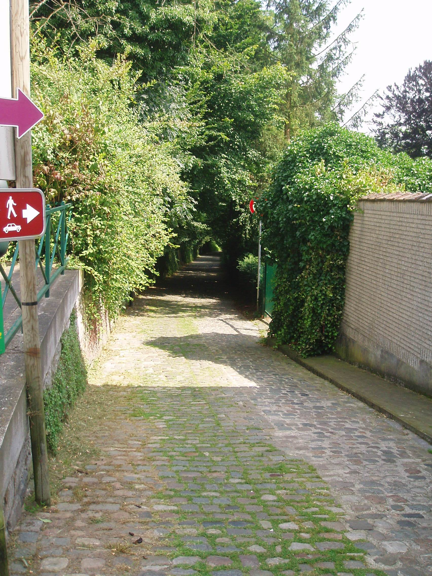 rue du Rouge-Cloître Auderghem Belgium